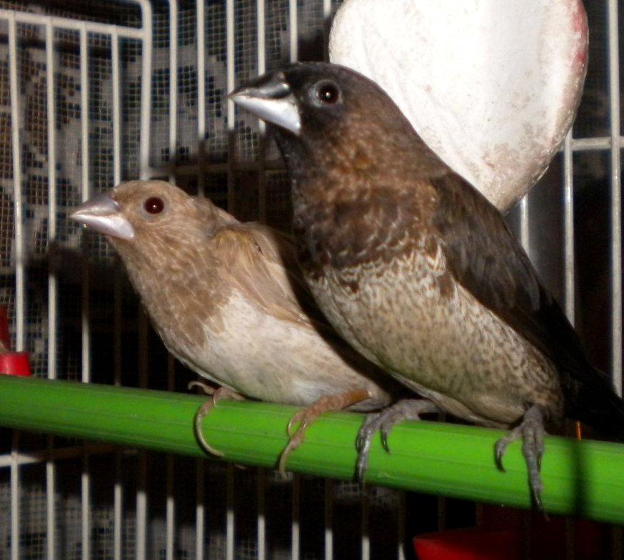 Mewki japońskie